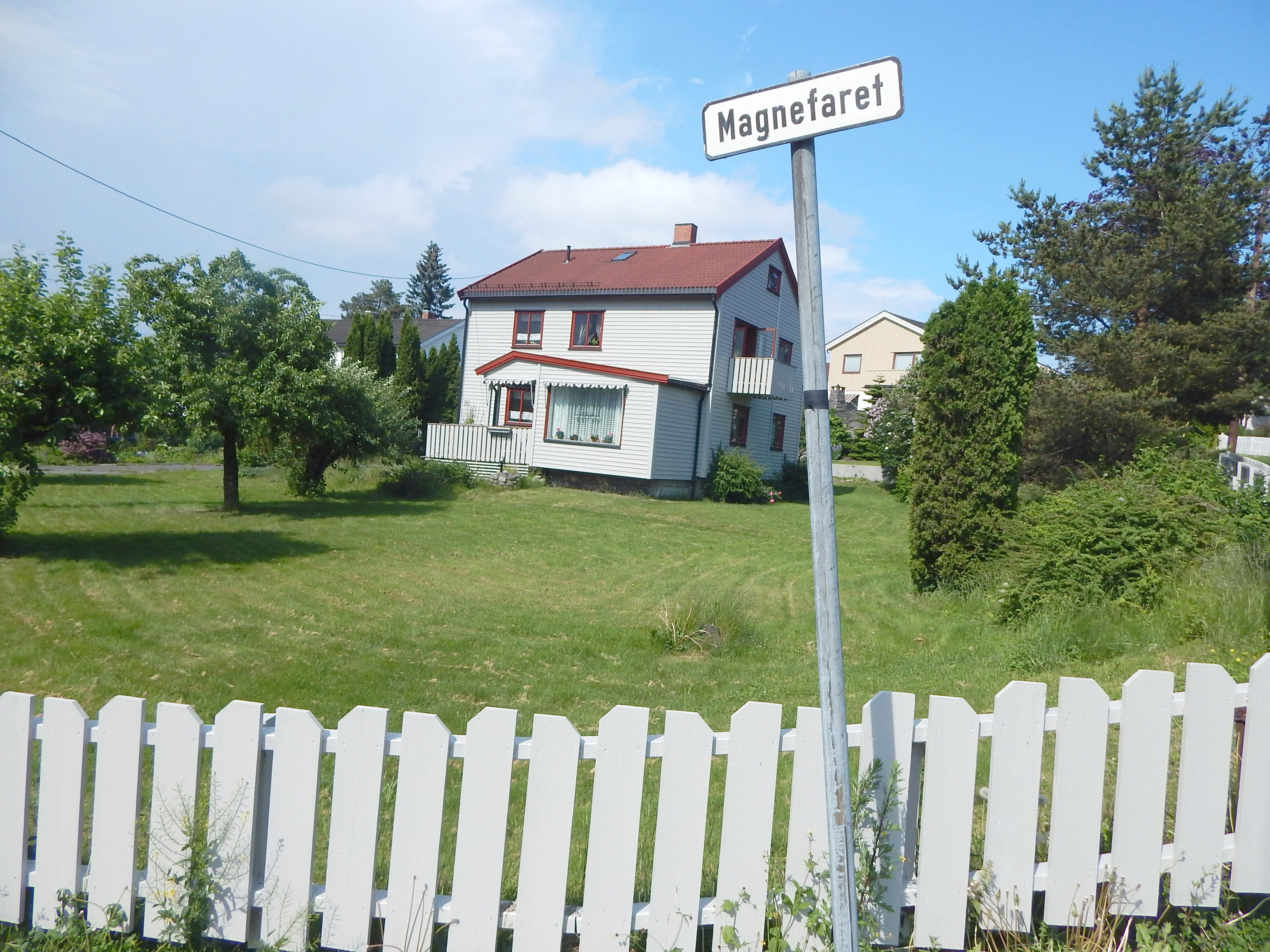 Magnefaret